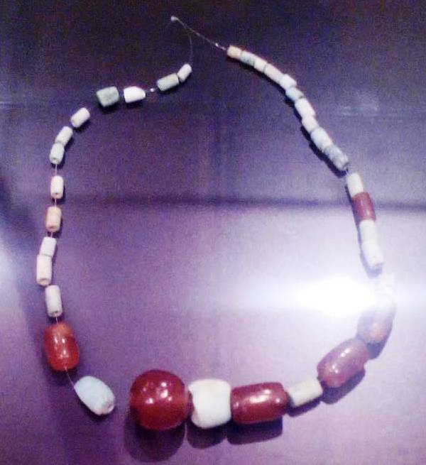 Colar atopado na Chousa Nova con contas de ambar.